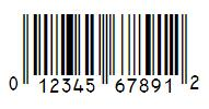 Code UPC